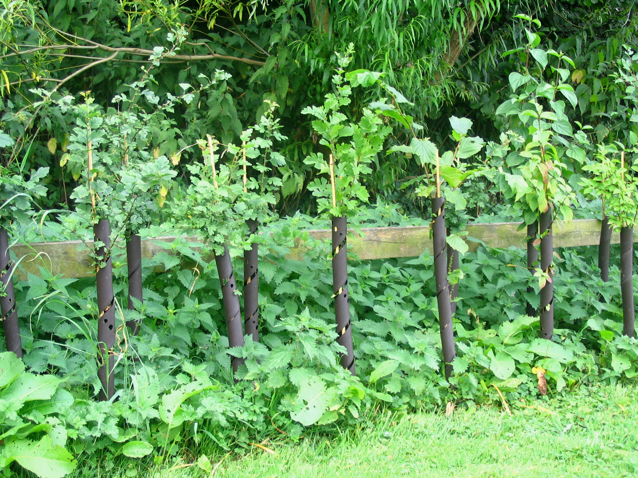 plantation de haie vive - angleterre Auteur: P. Charpiat - 2006